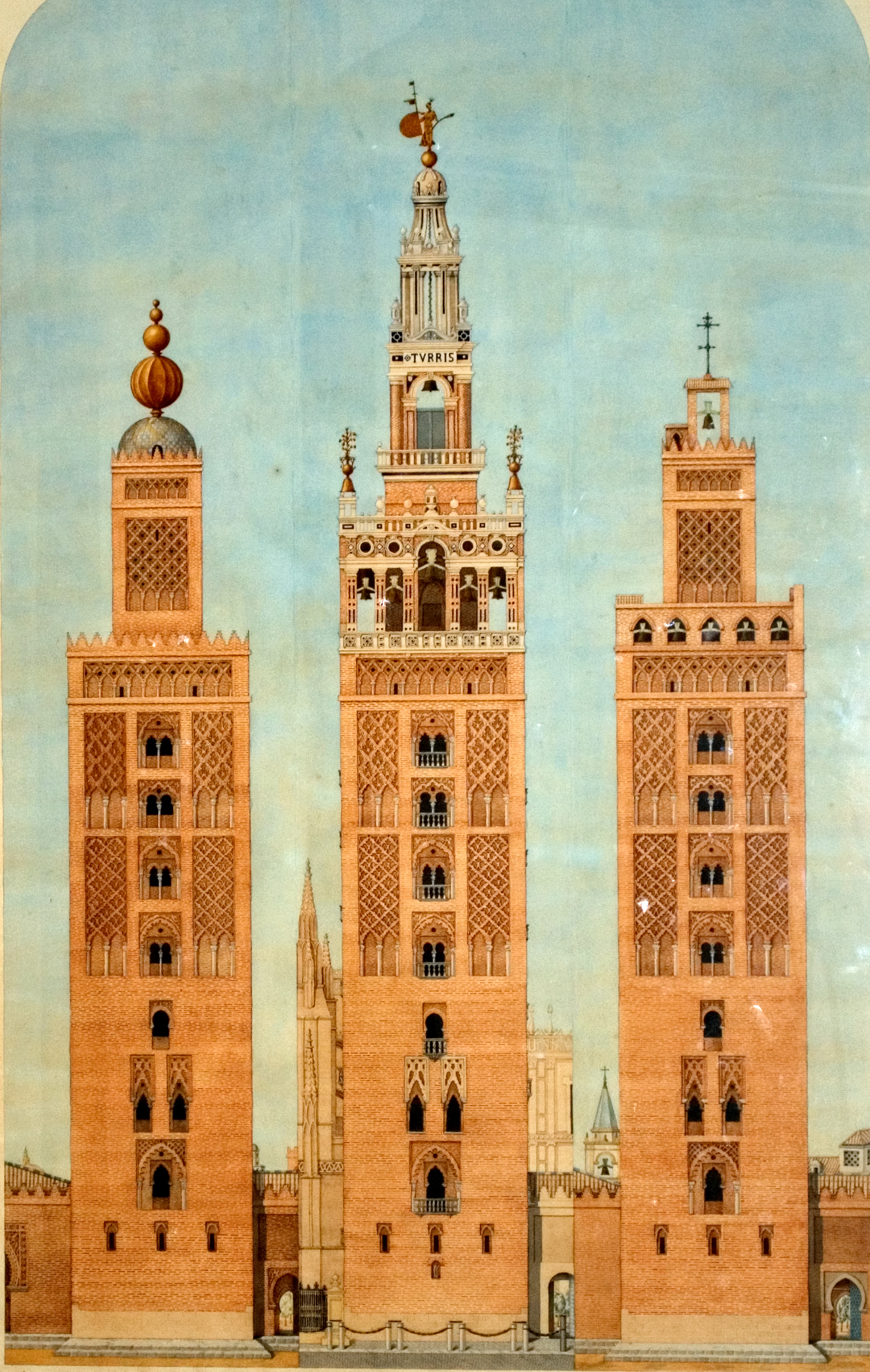 Los tres principales estados de la torre de Sevilla, 1909, autor Alejandro Guichot (Museo de Artes y Costumbres Populares de Sevilla)